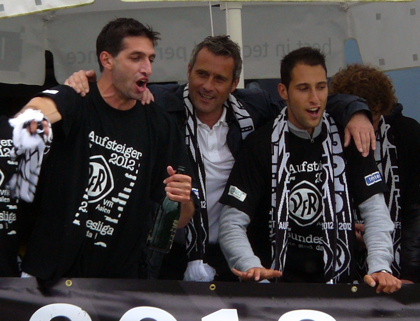 Leandro Grech, Markus Schupp und Marco Calamita bei der Aufstiegsfeier des VfR Aalen am 5. Mai 2012